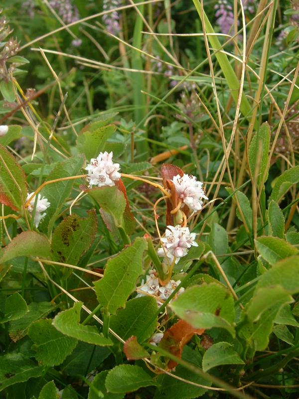 Cuscute du thym, Melles